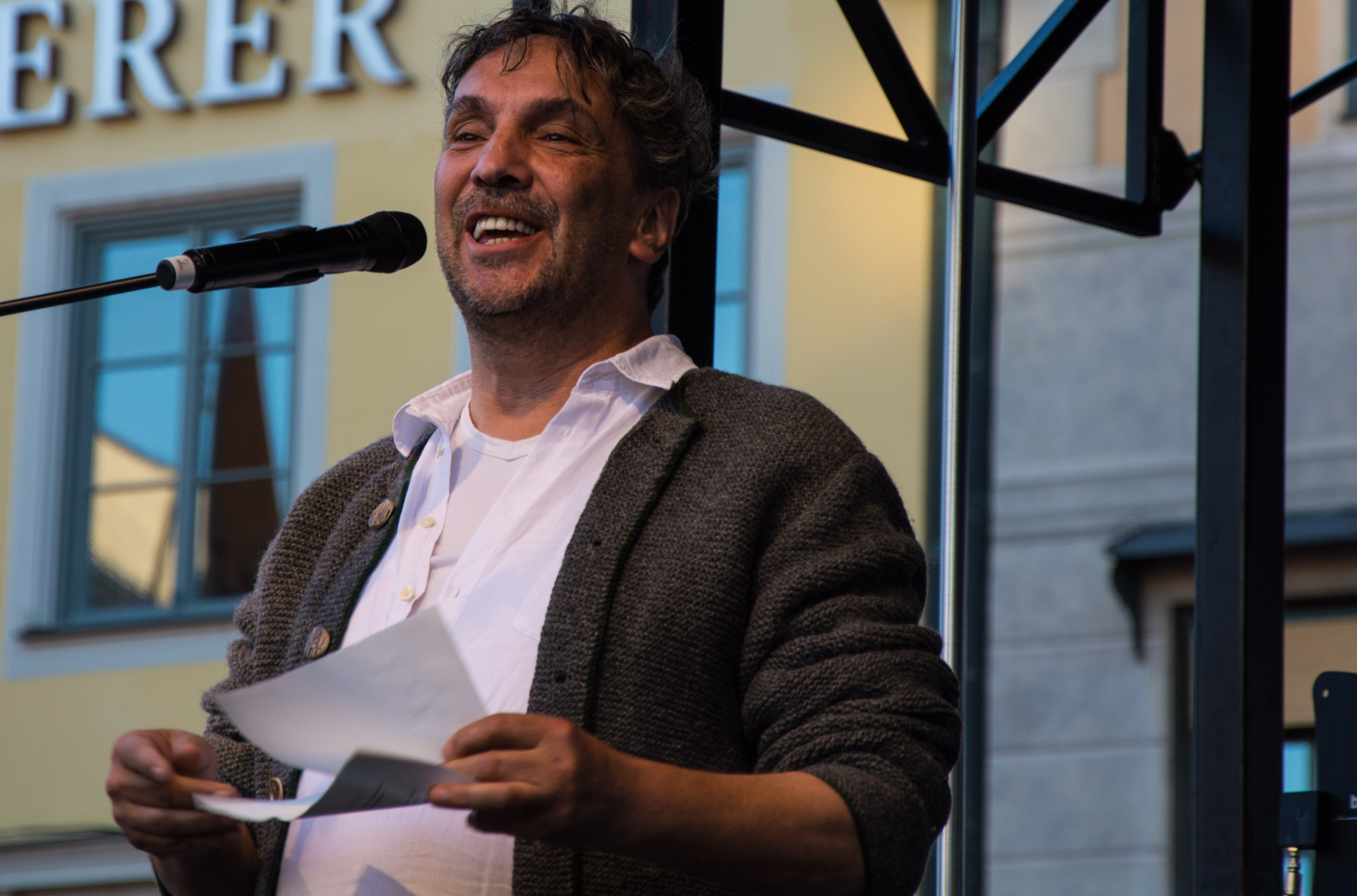 Der Intendant des Münchner Volkstheaters Christian Stückl auf einer Kundgebung in München